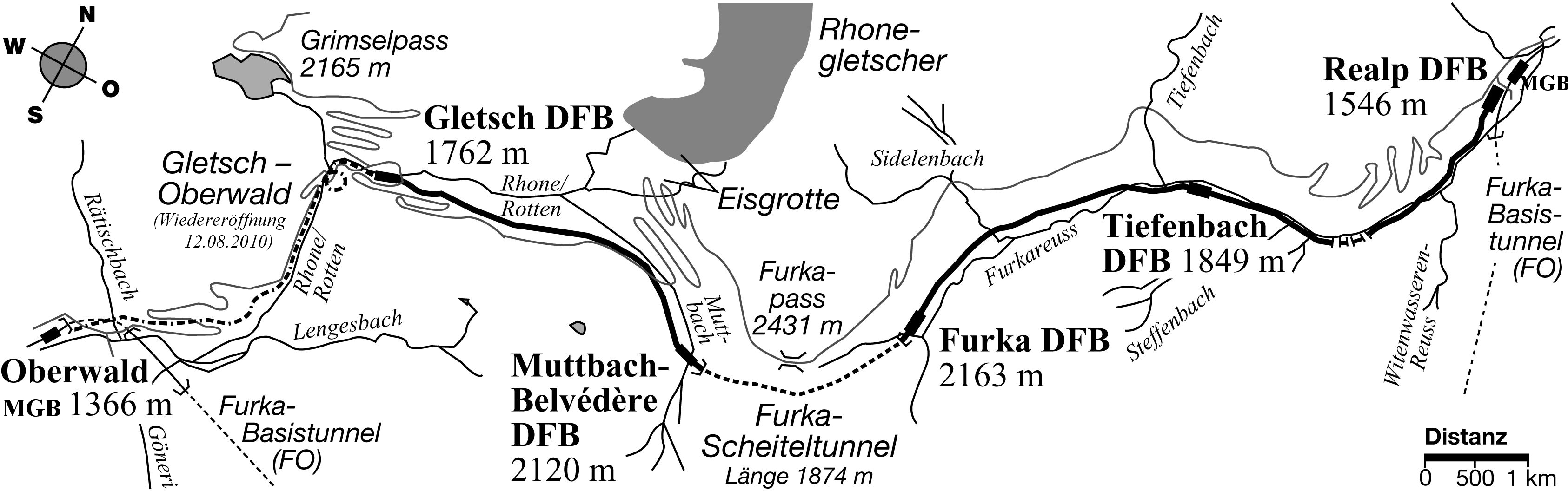 Dampfbahn Furka-Bergstrecke; Streckenkarte 2010